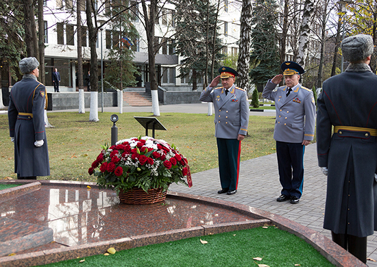 Министр обороны Российской Федерации генерал армии Сергей Шойгу и начальник Главного управления Генерального штаба Вооруженных Сил Российской Федерации генерал-полковник Игорь Коробов во время возложения цветов к памятнику военным разведчикам, погибшим при исполнении воинского долга